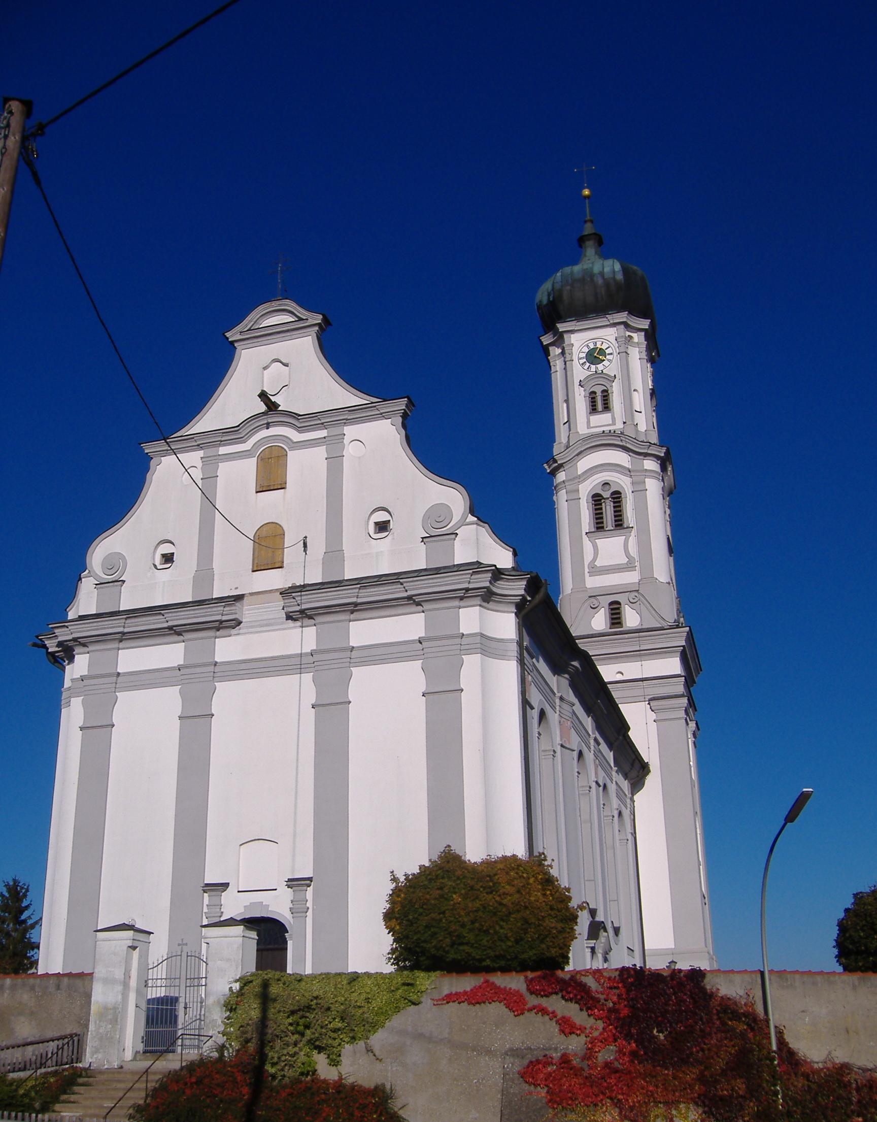 Tapfheim